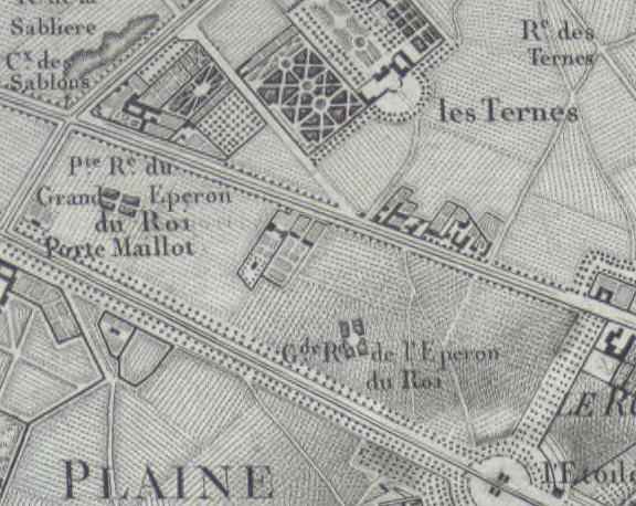 Notice complète Titre : Carte topographique des environs de Versailles dite des Chasses Impériales, levée et dressée de 1764 à 1773 par les ingénieurs géographes des Camps et Armées, commandés par feu M. Berthier, Colonel, leur chef ; terminée en 1807 par ordre de Napoléon, Empereur des Français, Roi d'Italie et Protecteur de la Confédération du Rhin, pendant le Ministère de S.A.S.M. le Maréchal Alexandre Berthier, Prince de Neuchatel, Grand-Veneur, Grand Aigle de la Légion d'Honneur, etc. etc., sous la direction du Général de Division Sanson / Gravé par Doudan, Tardieu l'ainé et Boudet Auteur : Berthier, Alexandre (1753-1815). Auteur du texte Auteur : Sanson, Nicolas-Antoine (1756-1824). Auteur du texte Auteur : Houdan, François d' (1748-1828). Graveur Auteur : Tardieu, P.F. (17..-18.. ; graveur vers 1788). Graveur Auteur : Boudet (17..-18.. ; graveur). Graveur Auteur : France. Dépôt de la guerre. Éditeur scientifique Éditeur : Dépôt de la Guerre (Paris) Date d'édition : 1807 Sujet : Chasse Sujet : Versailles -- Environs Type : document cartographique,carte,image fixe Langue : Français